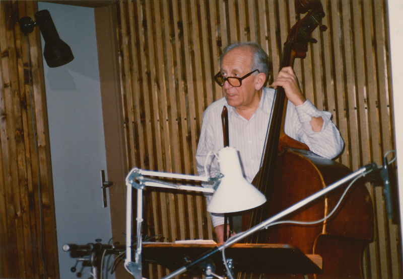 Erwin Ernst Kunz am Kontrabass, April 1989